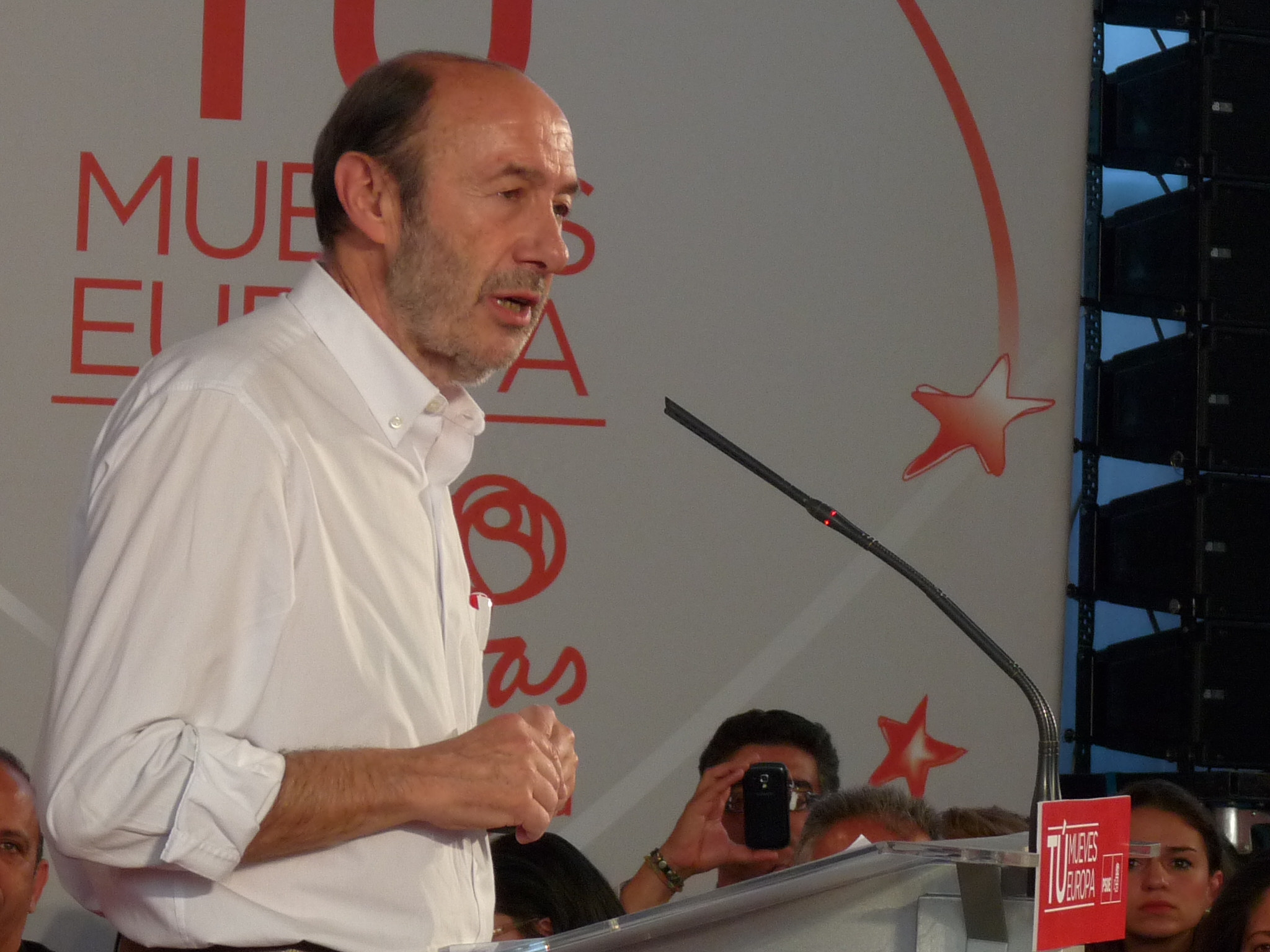 Acto en Badajoz